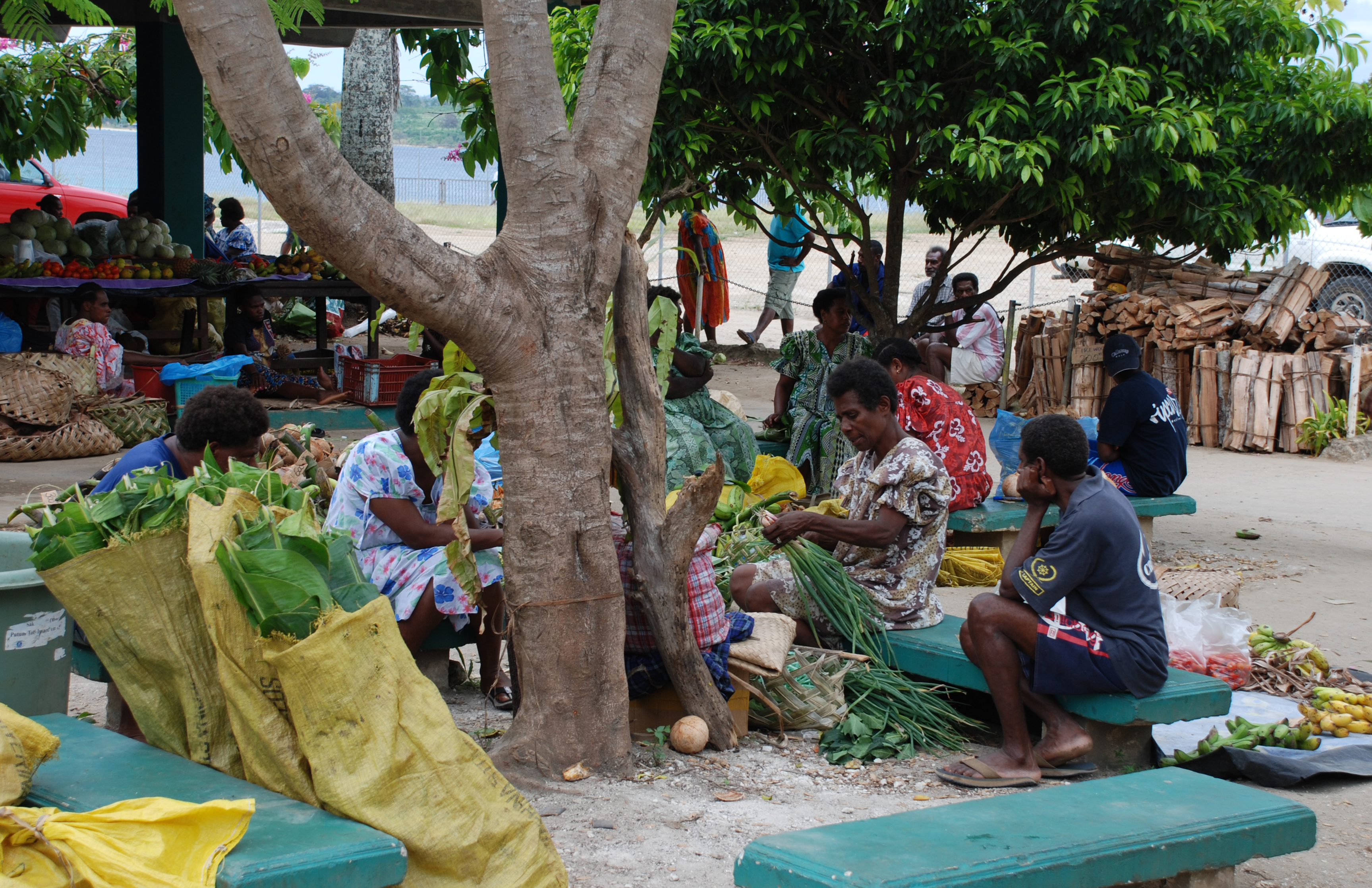 Port Vila market, Vanuatu, Nov. 2006